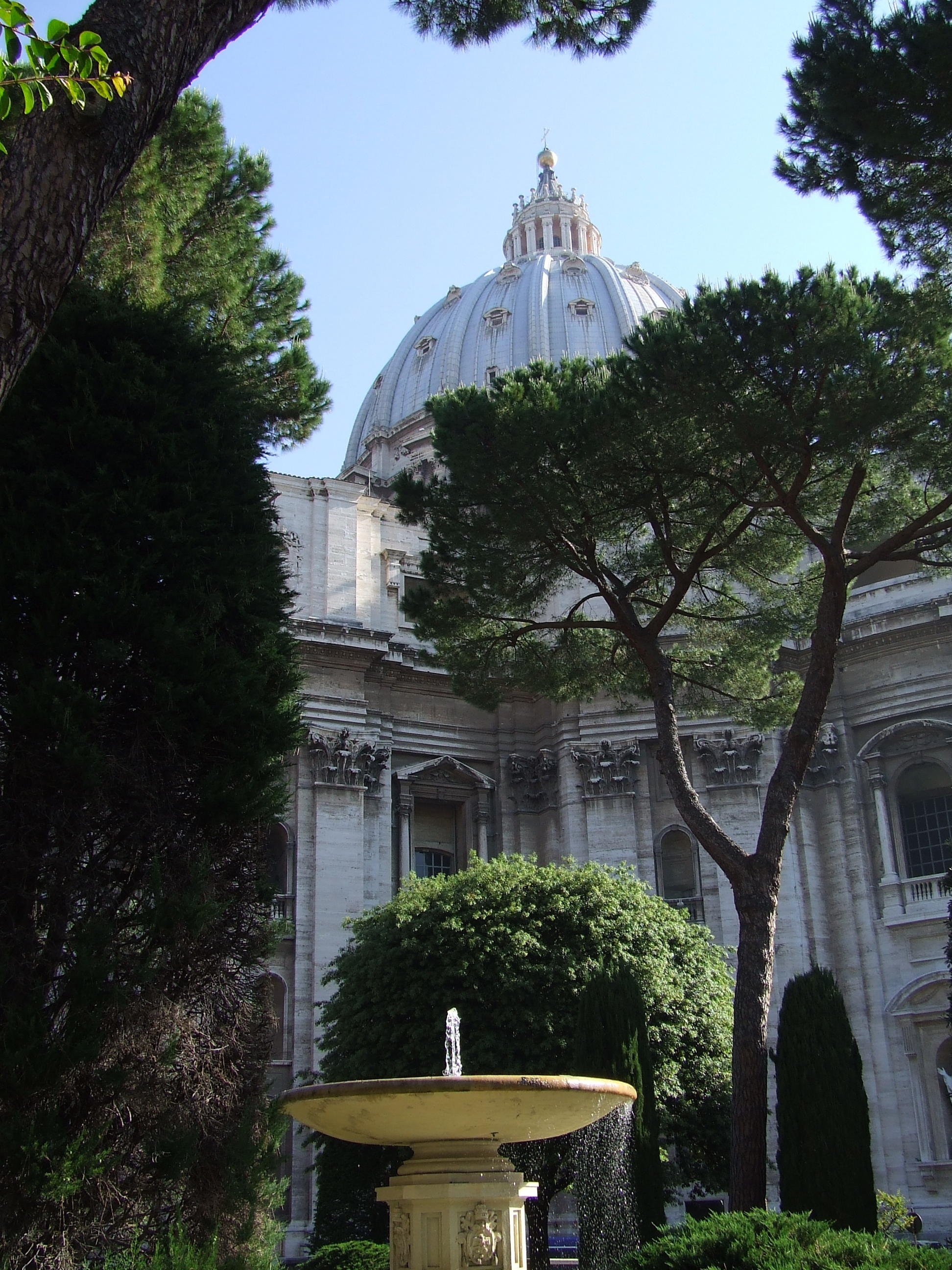 Vatikanische Gärten mit Durchblick auf die Kuppel des Petersdoms